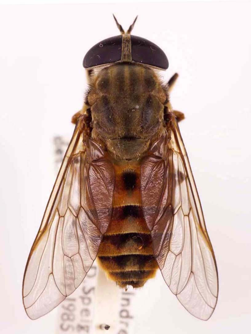 Tabanus eggeri France